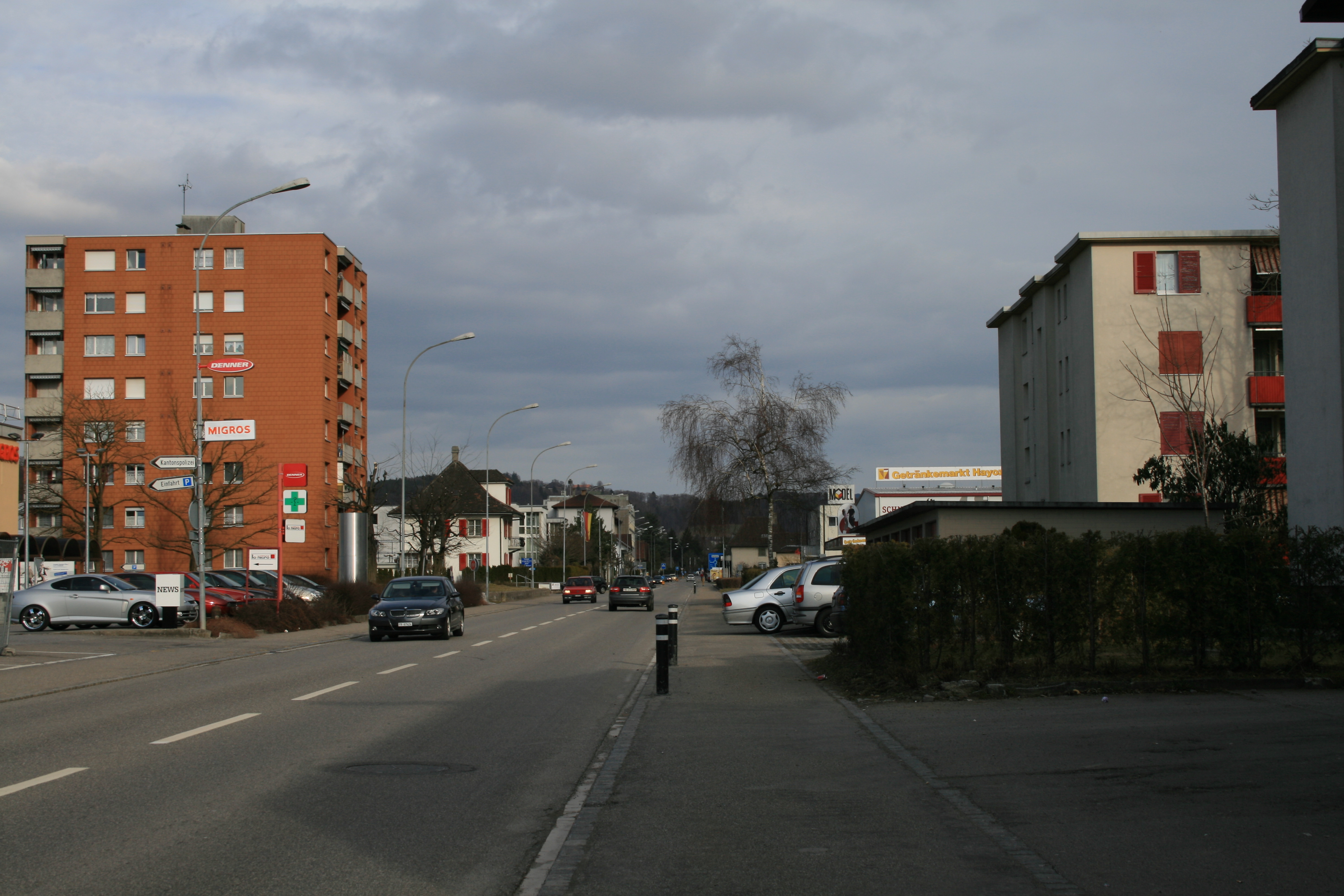 Strasse in Flamatt FR, Schweiz